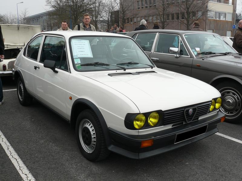 Reims 2012